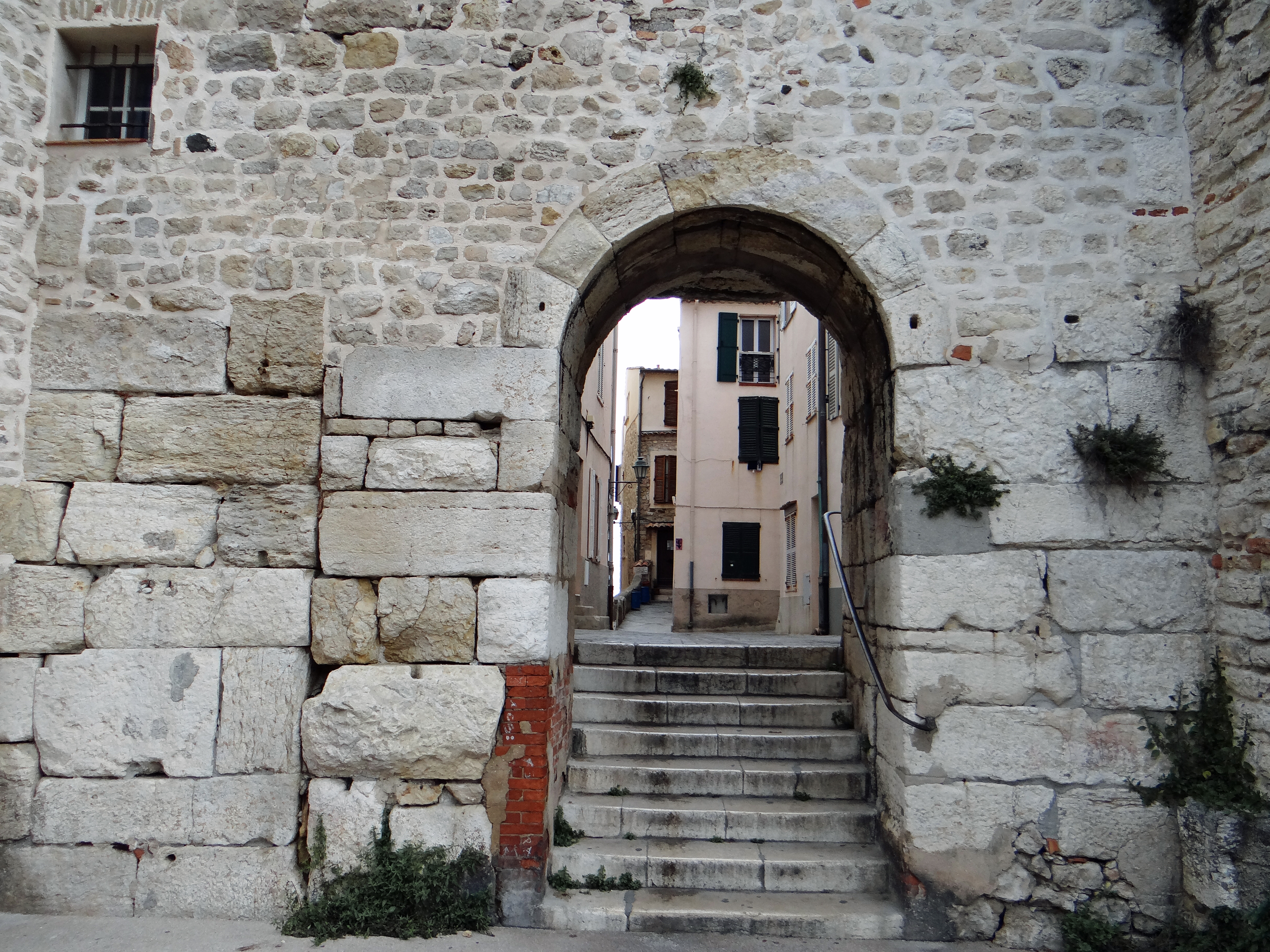 Antibes - Porte de l'Orme - En partie inférieure, vestige de la porte de l'enceinte gréco-romaine qui a été réduite